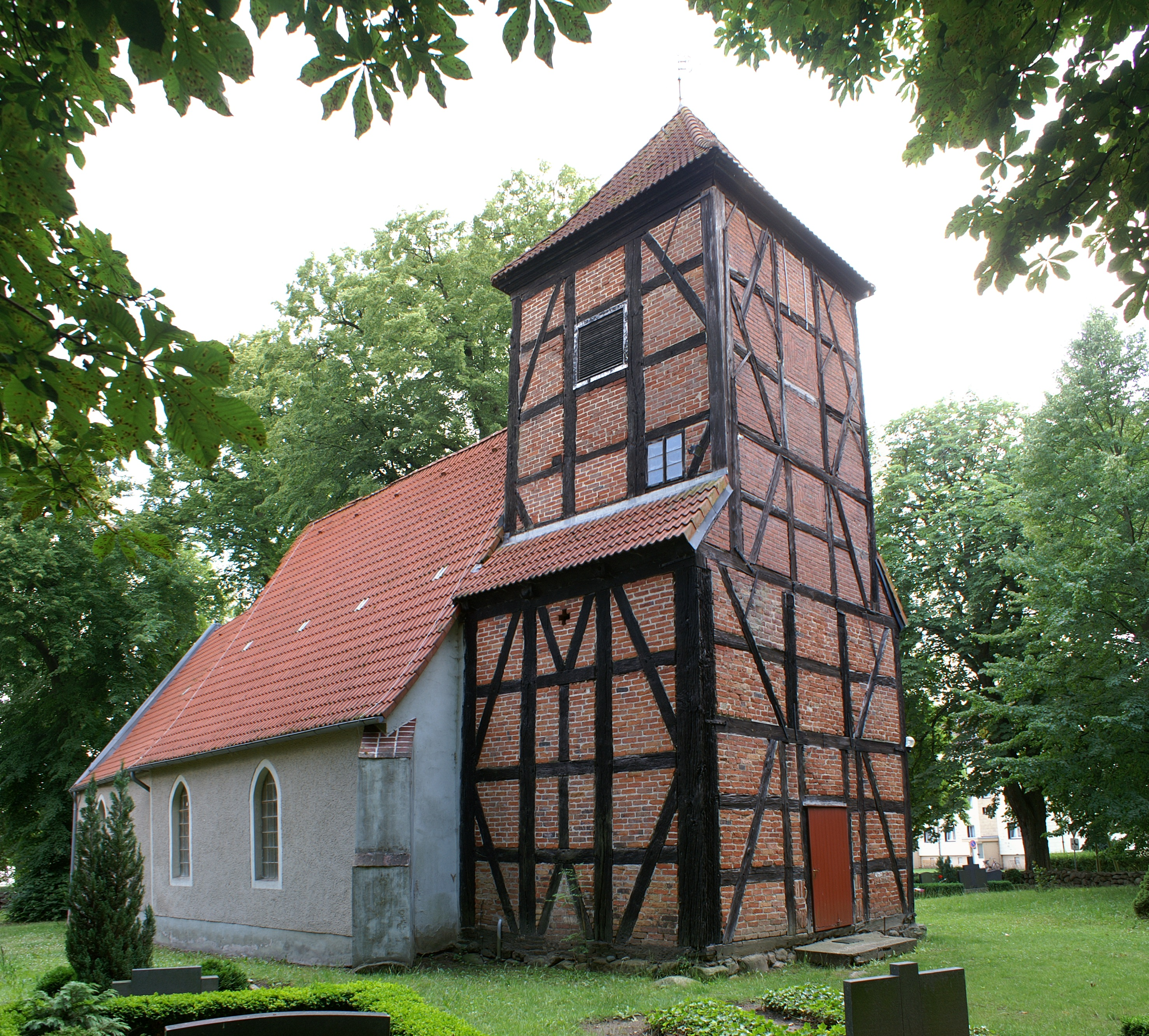 Kirche in Blesewitz, Ansicht von Nordwesten